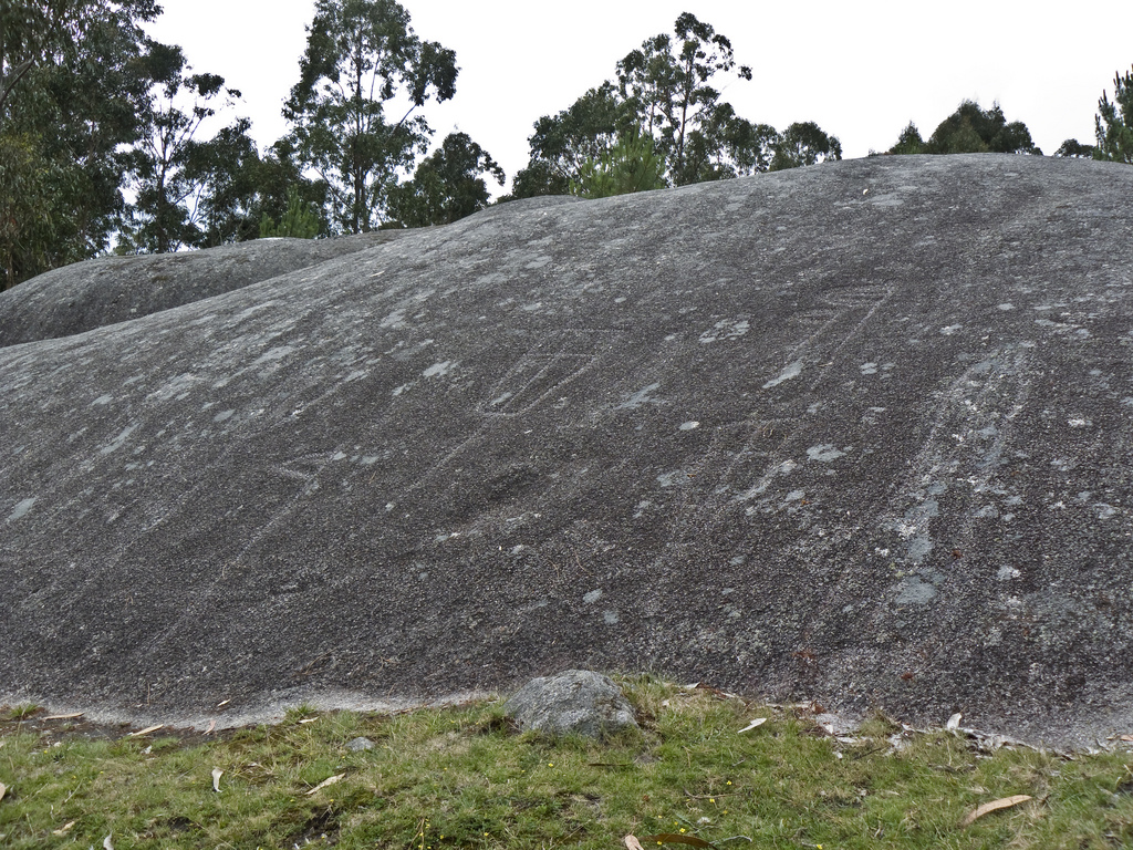 Petroglifos da Auga da Laxe. Panel nº 1 - "Pedra das procesións"